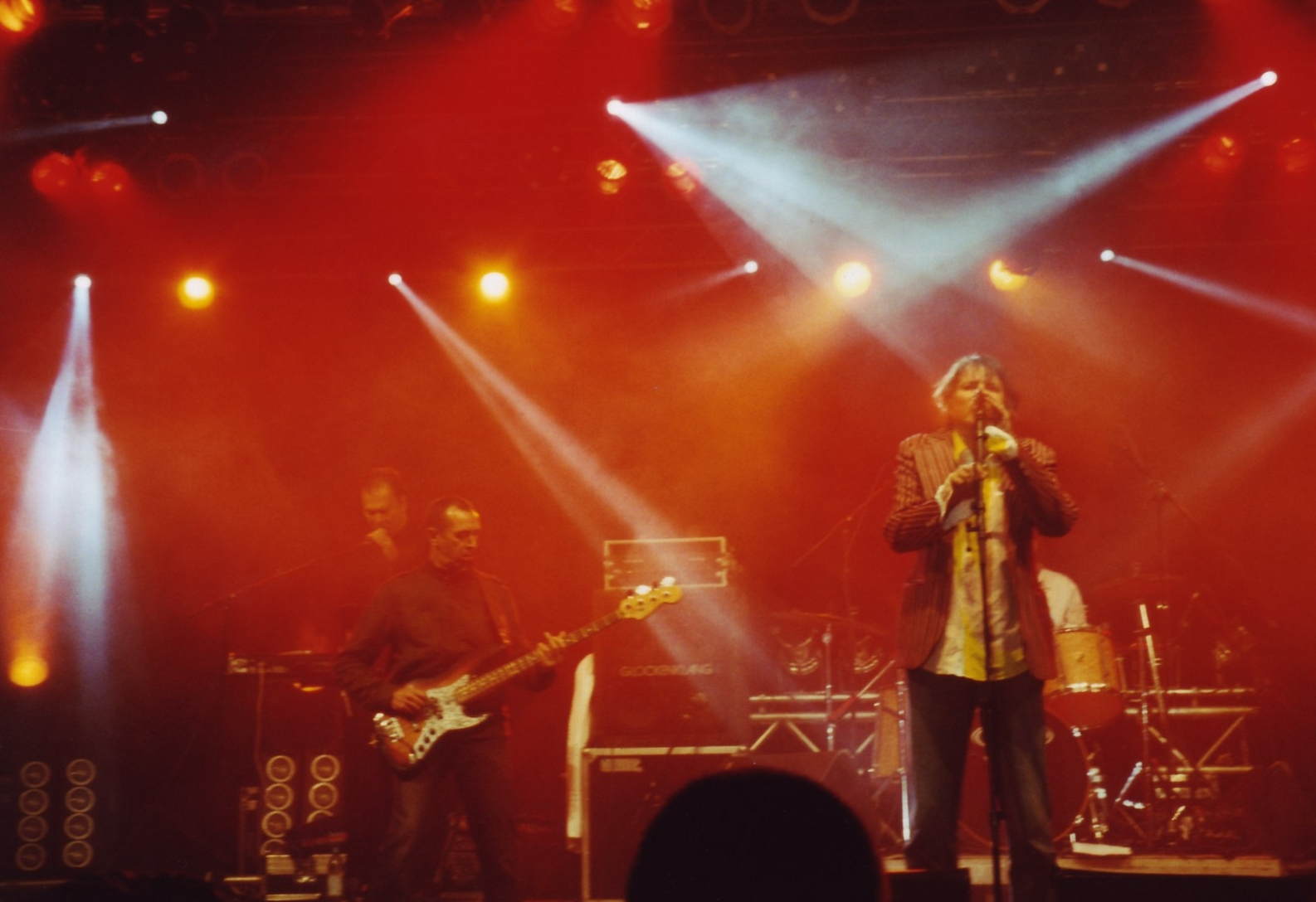 Die Band Fehlfarben beim Open-Air-Konzert „Seegeflüster“ in Hagen. V.l.n.r.: Keyboarder Pyrolater, Bassist Michael Kemmner, Sänger Peter Hein und Schlagzeugerin Saskia von Klitzing (verdeckt).